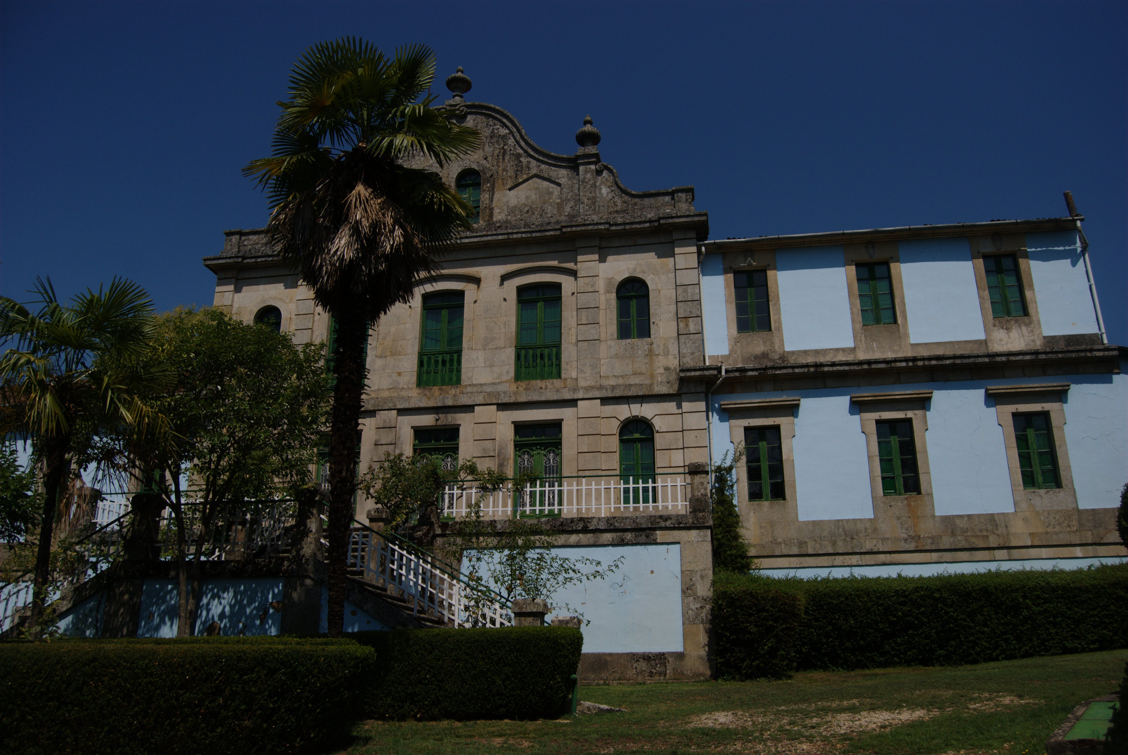 Balneario de Cabreiroá, Verín